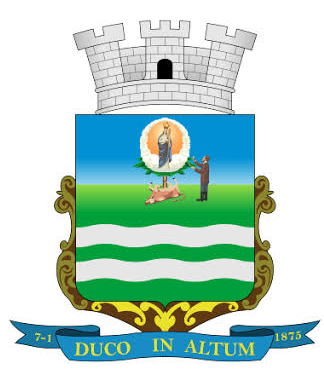 Brasão de armas do município de Entre Rios de Minas